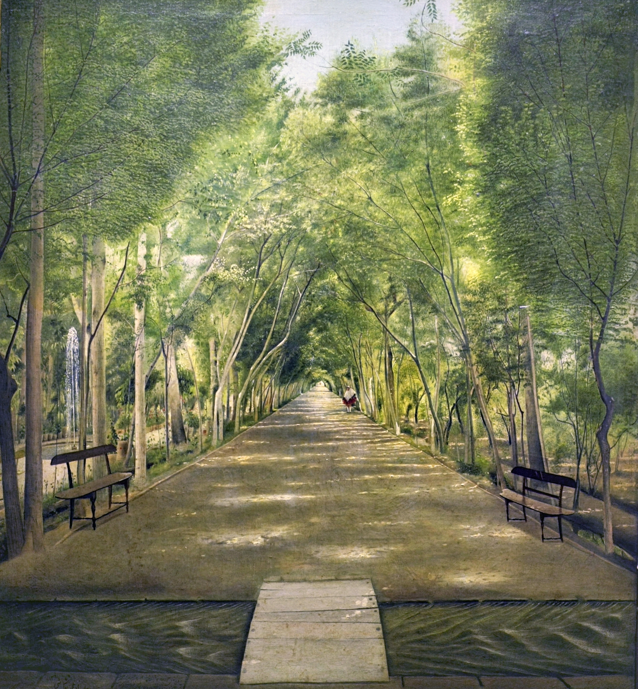 Dushan Tappelabel QS:Len,"Dushan Tappe" label QS:Lfa,"خیابان دوشان‌تپه" label QS:Ltr,"Dushan Tappe, Tahran'ın banliyölerinden biri, (1899) Üreten: Kamal-ol-molk."